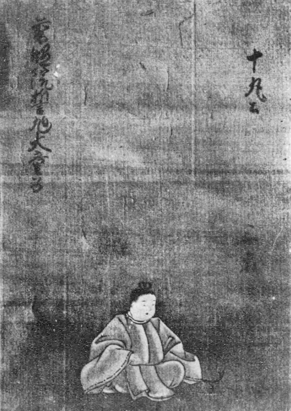 豊臣秀次三男十丸（京都瑞泉寺所蔵）